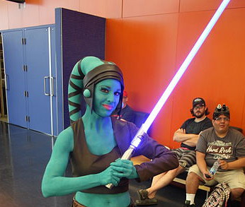 Aayla Secura Cropped